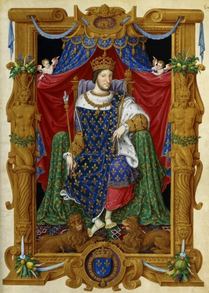 Jean Du Tillet - François Ier. Recueil des rois de France - Bibliothèque nationale de France.